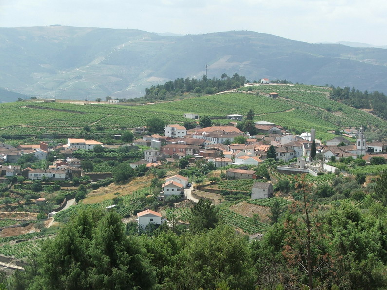 Vista parcial de Castedo do Douro